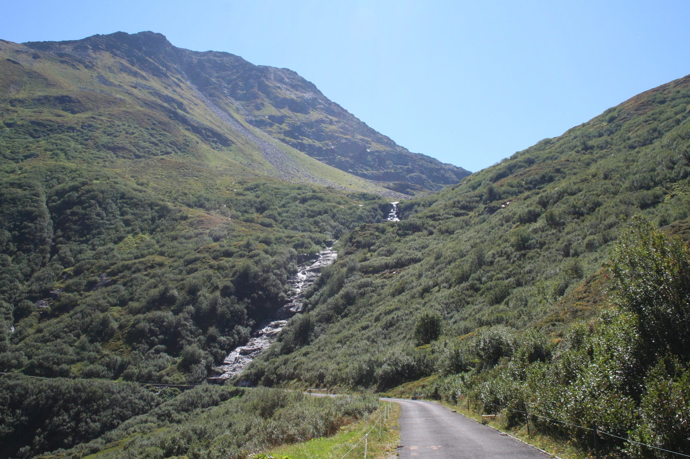 Rein da Tuma, dahinter Piz Cavradi (2614 m)